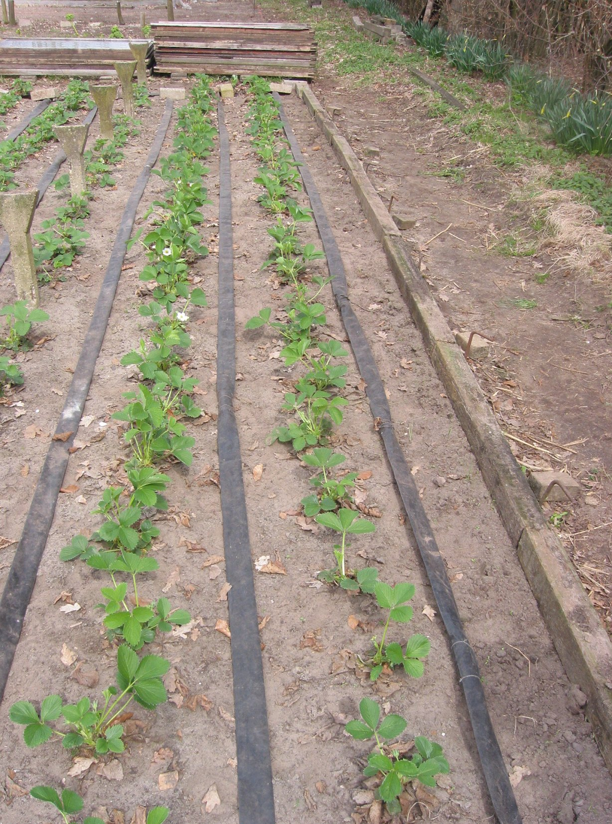 Gietdarmen in aardbei